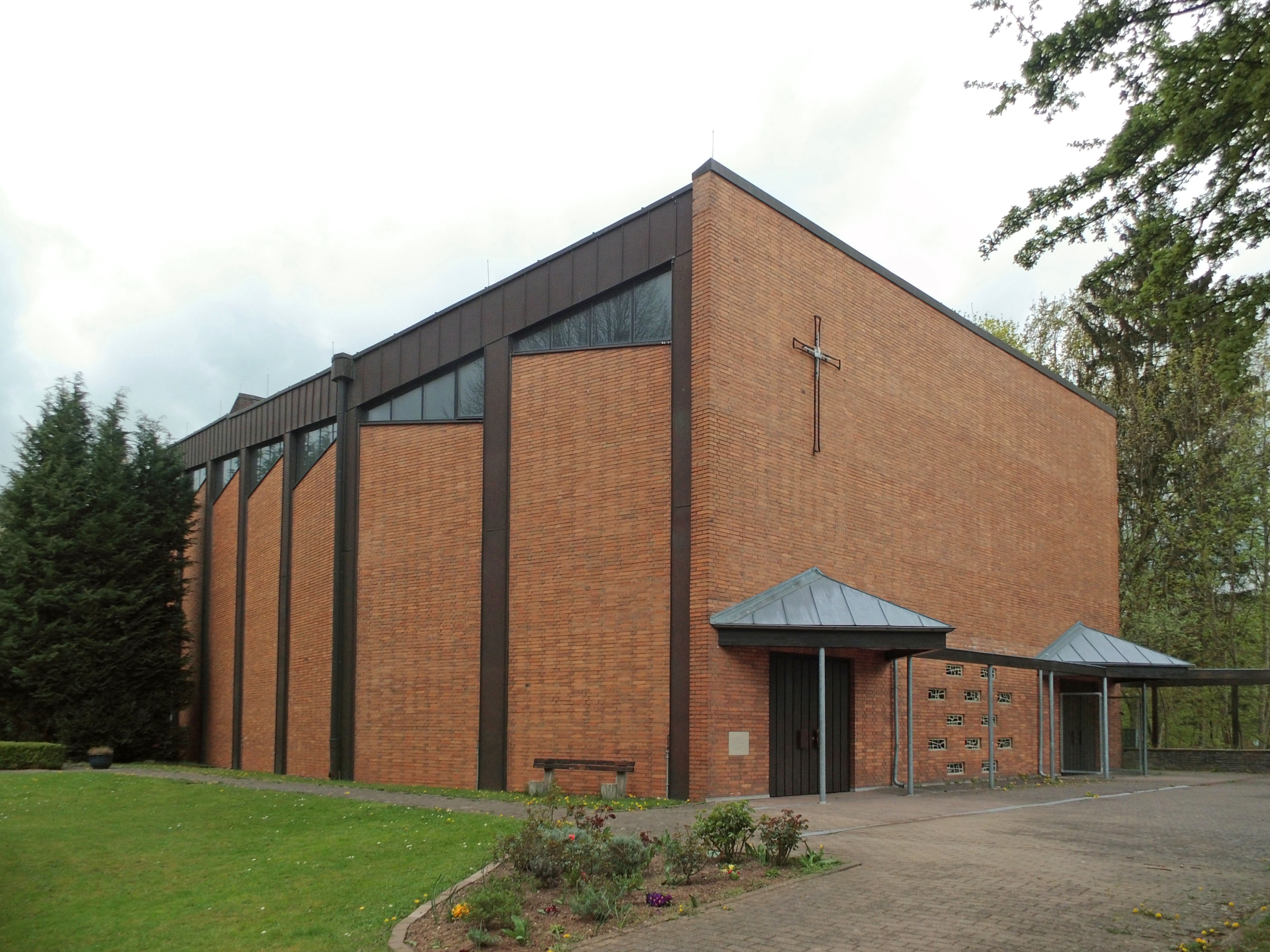 Katholische Christ-König-Kirche in Salzgitter-Bad.